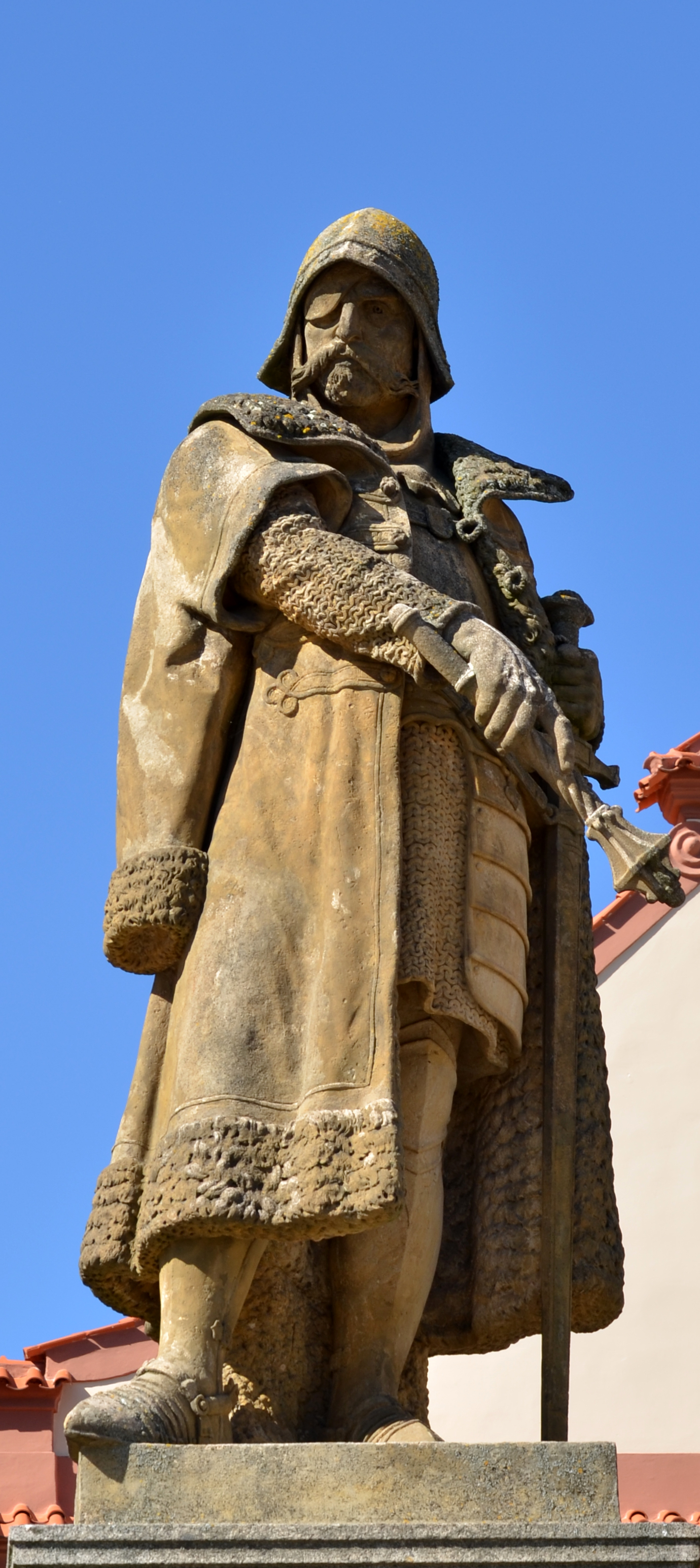 Josef Strachovský, Jan Žižka (1884), Tábor